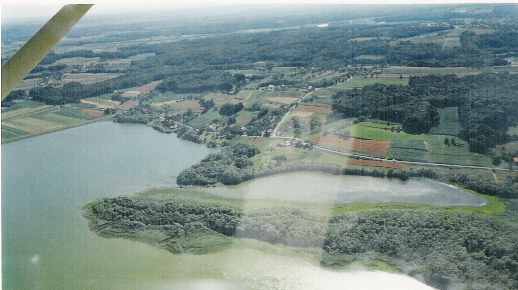 Ledavsko jezero iz zraka v poletnih mesecih (jezeru domačini pravijo tudi kraško jezero, saj precejšen del jezera leži v vasi Krašči)